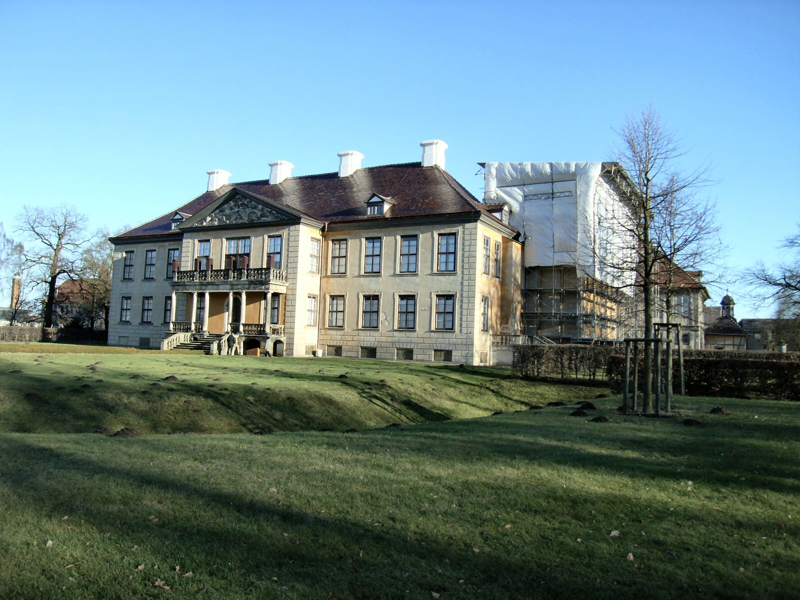 Schloss Oranienbaum